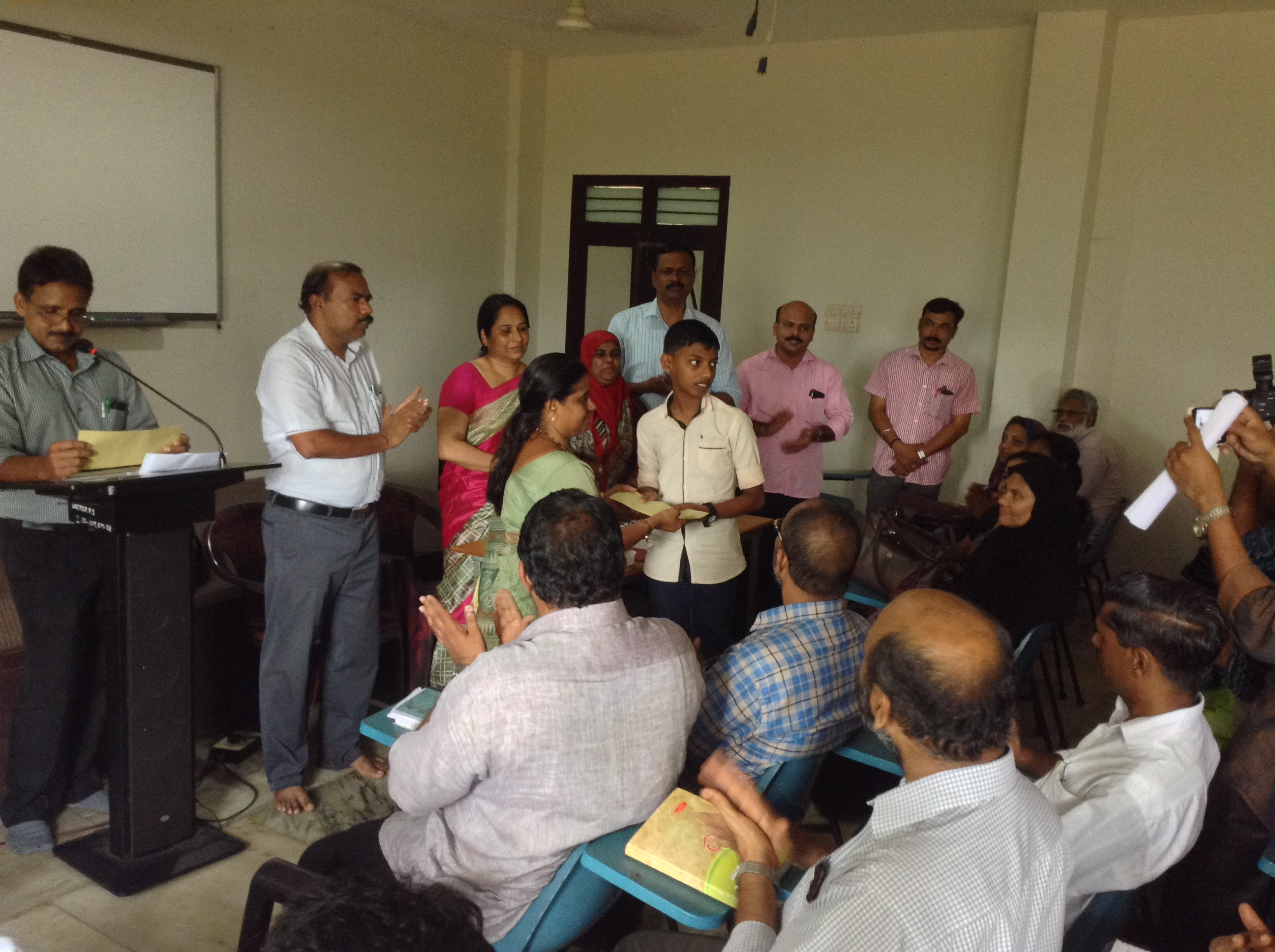 മലപ്പുറം ജില്ലയെ അറിയാൻ എന്ന ക്വിസ് മത്സരത്തിൽ രണ്ടാം സ്ഥാനം നേടുന്ന ജി.എച്ച്.എസ്.എസ്. ഇരുമ്പുഴിയിലെ വിദ്യാർഥി